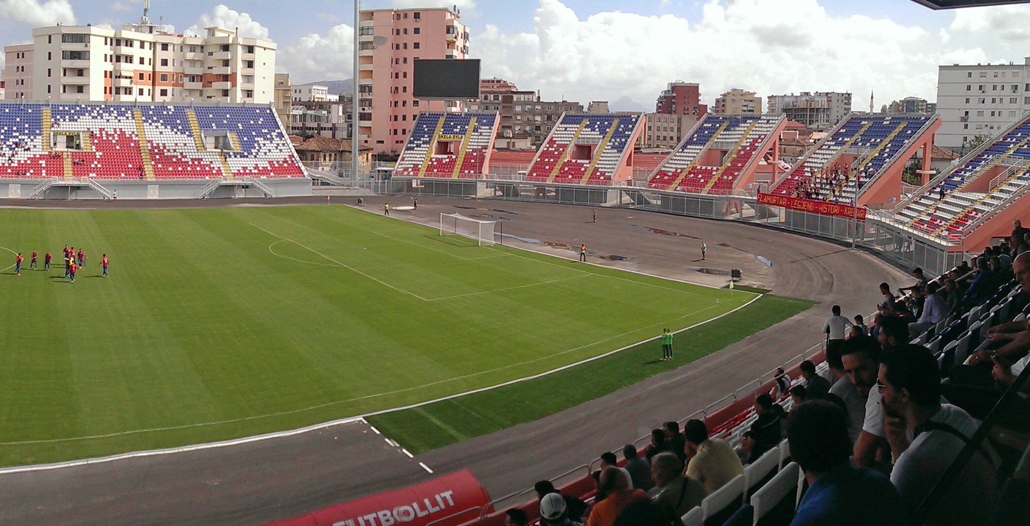 Vllaznia Shkoder playing against Flamurtari Vlore